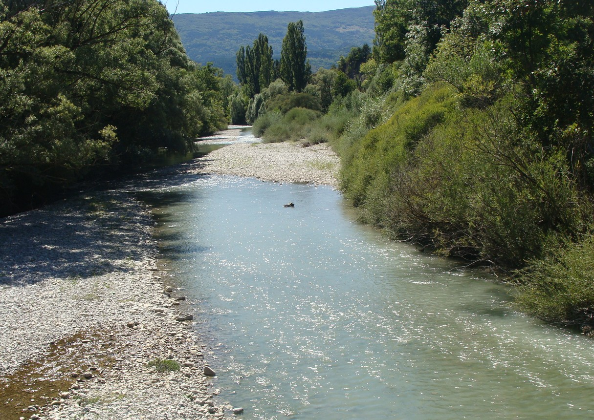 Le Buech à Aspremont (vue vers l'aval depuis le pont de la nationale).